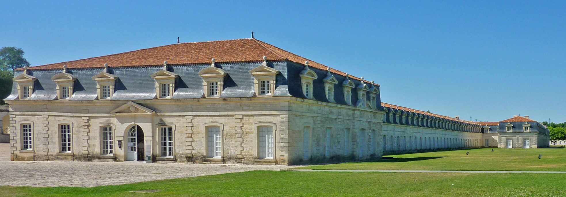 La Corderie Royale Rochefort Charente Maritime France